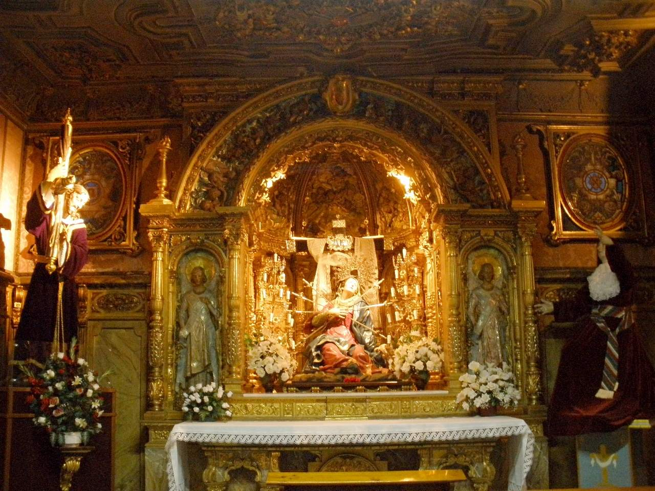 Iglesia de la Vera Cruz (Salamanca)